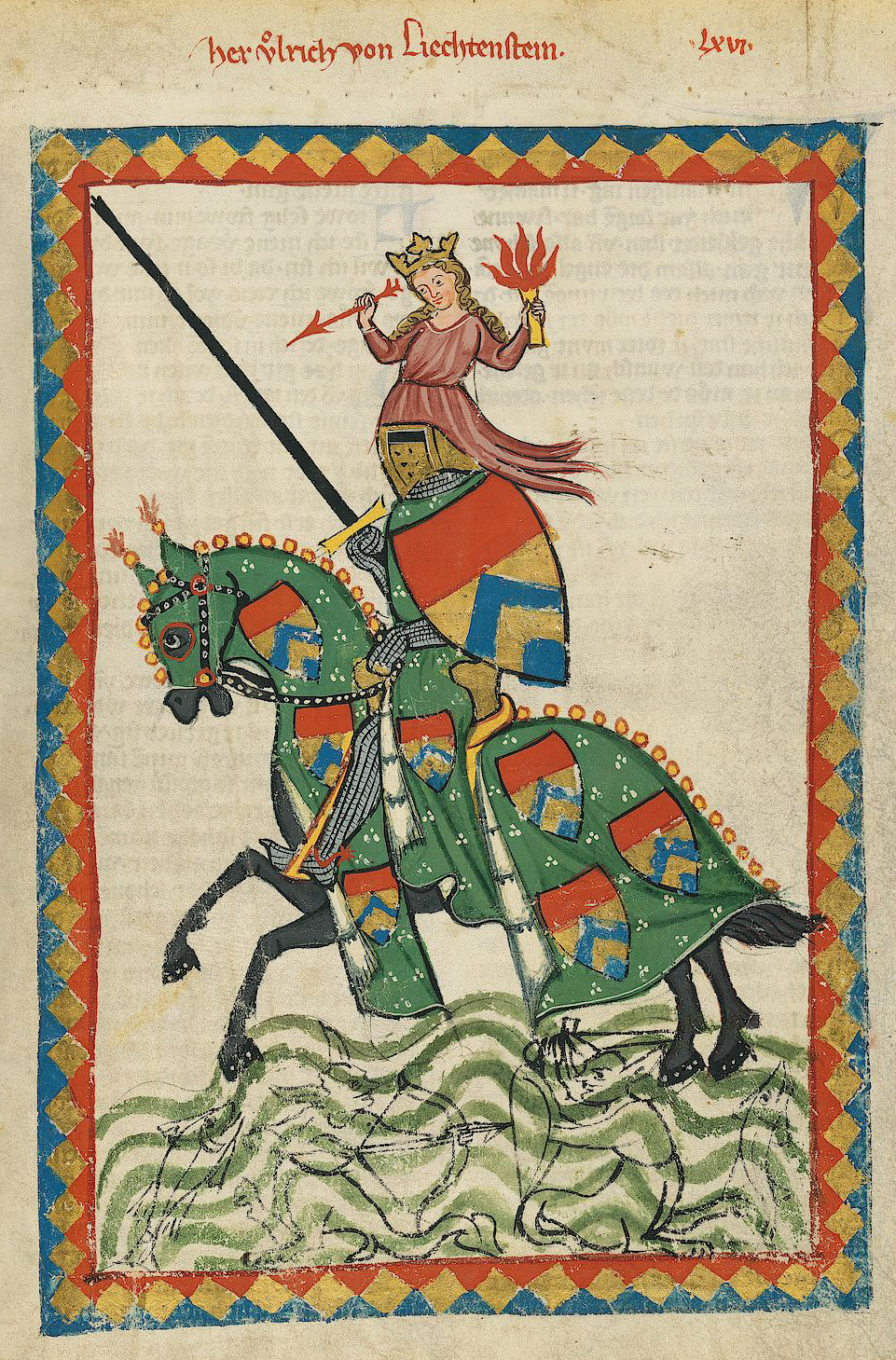 Codex Manesse, UB Heidelberg, Cod. Pal. germ. 848, fol. 237r, Herr Ulrich von Liechtenstein